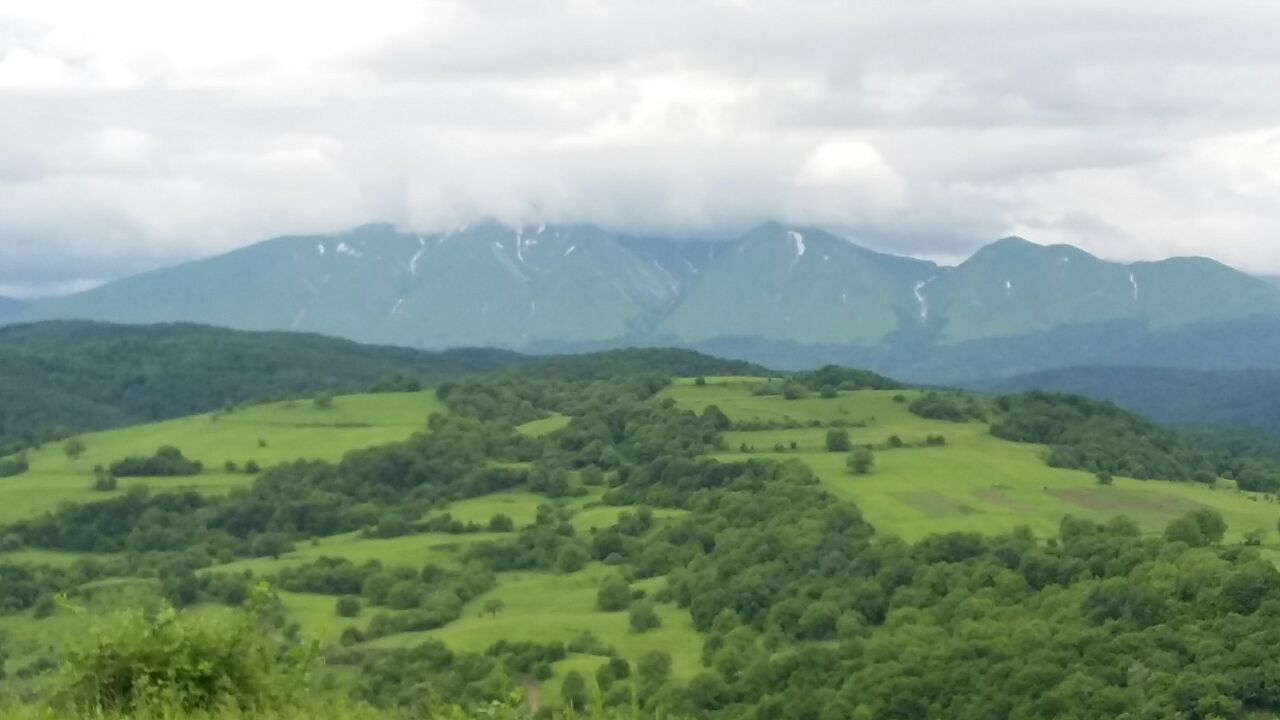 Албури-Отар (Булкха дихье)